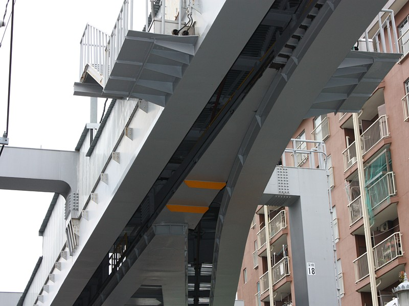 Aiguillage de monorail Shōnan